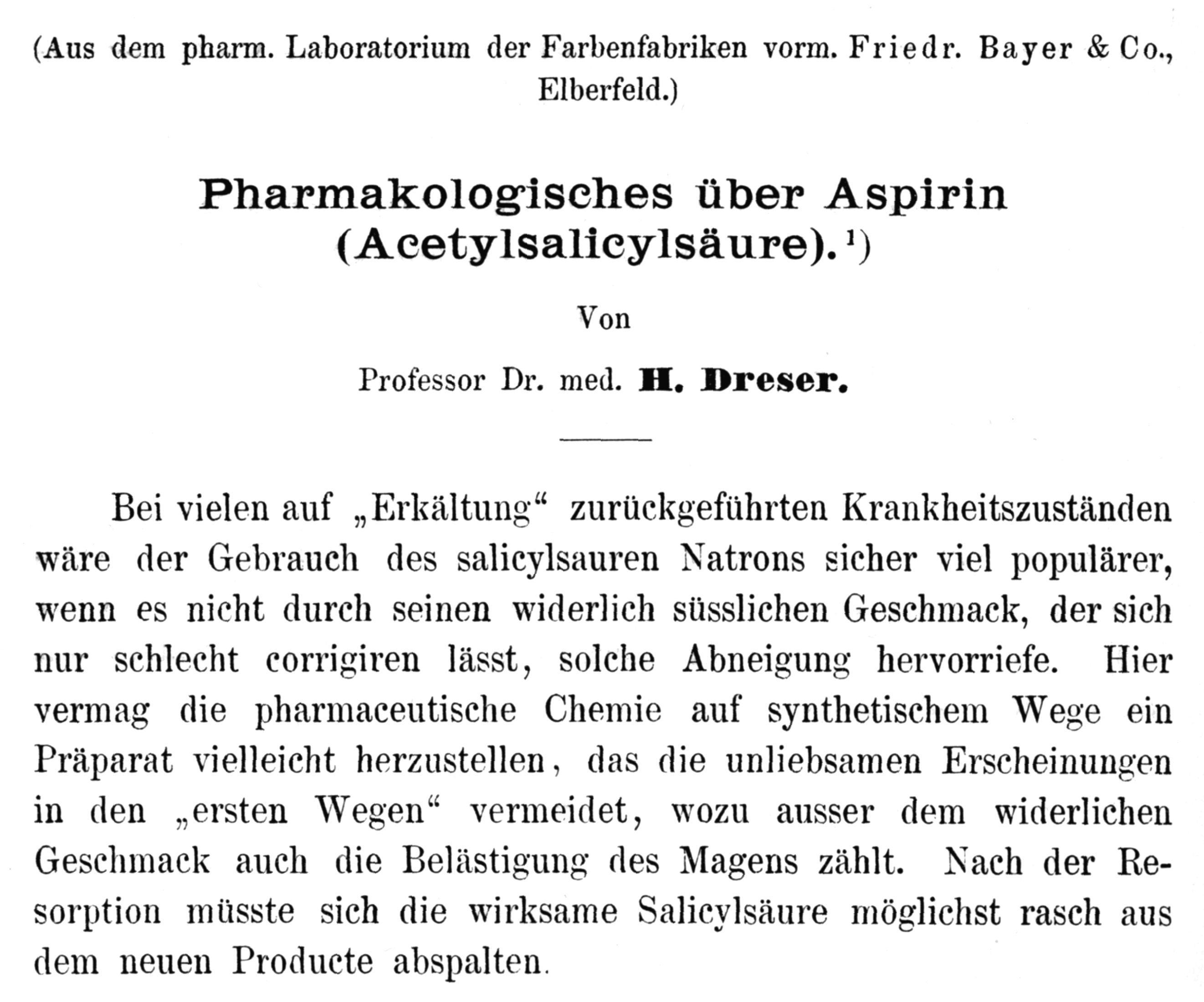 Titelblatt von Dresers Einführungspublikation des Aspirins, Pflügers Archiv 1899